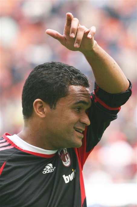 Serignho (Sérgio Cláudio dos Santos)